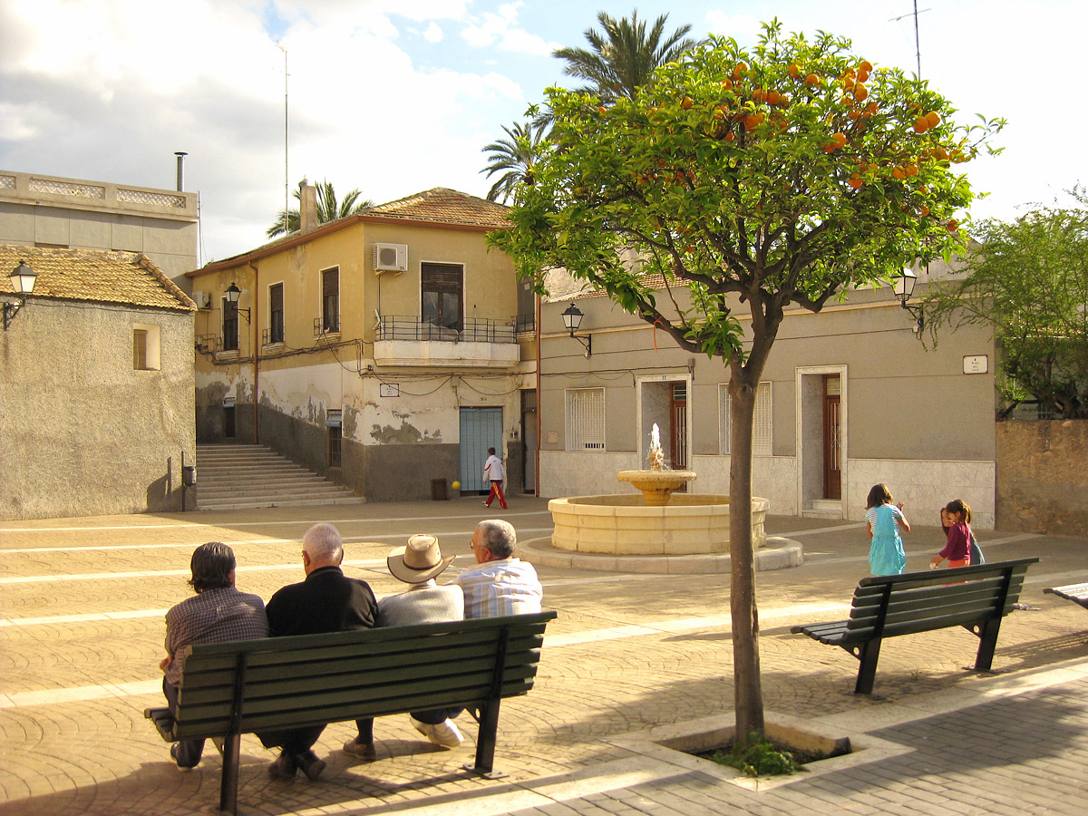 Young and old in a square in the Elche Raval (Valencian Country, Spain). Joves i grans en una plaça del raval d'Elx, País Valencià.